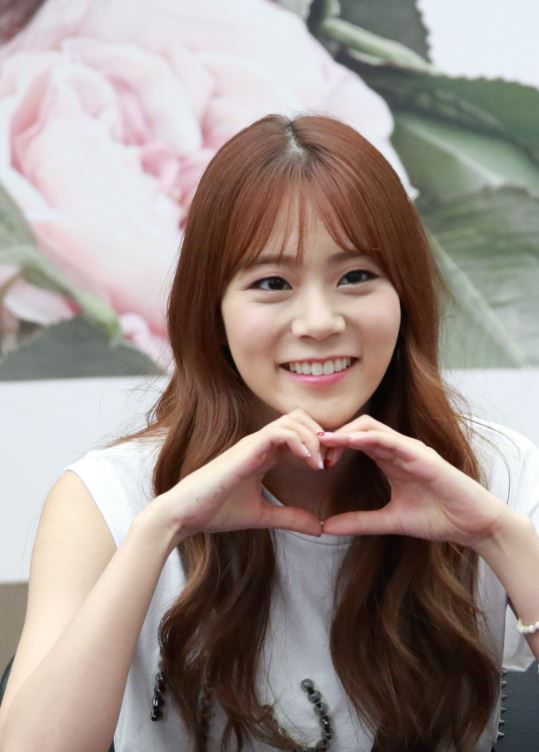 150528 코엑스 팬사인회 카라 한승연